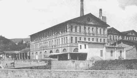 La fabbrica come appariva nel '68.